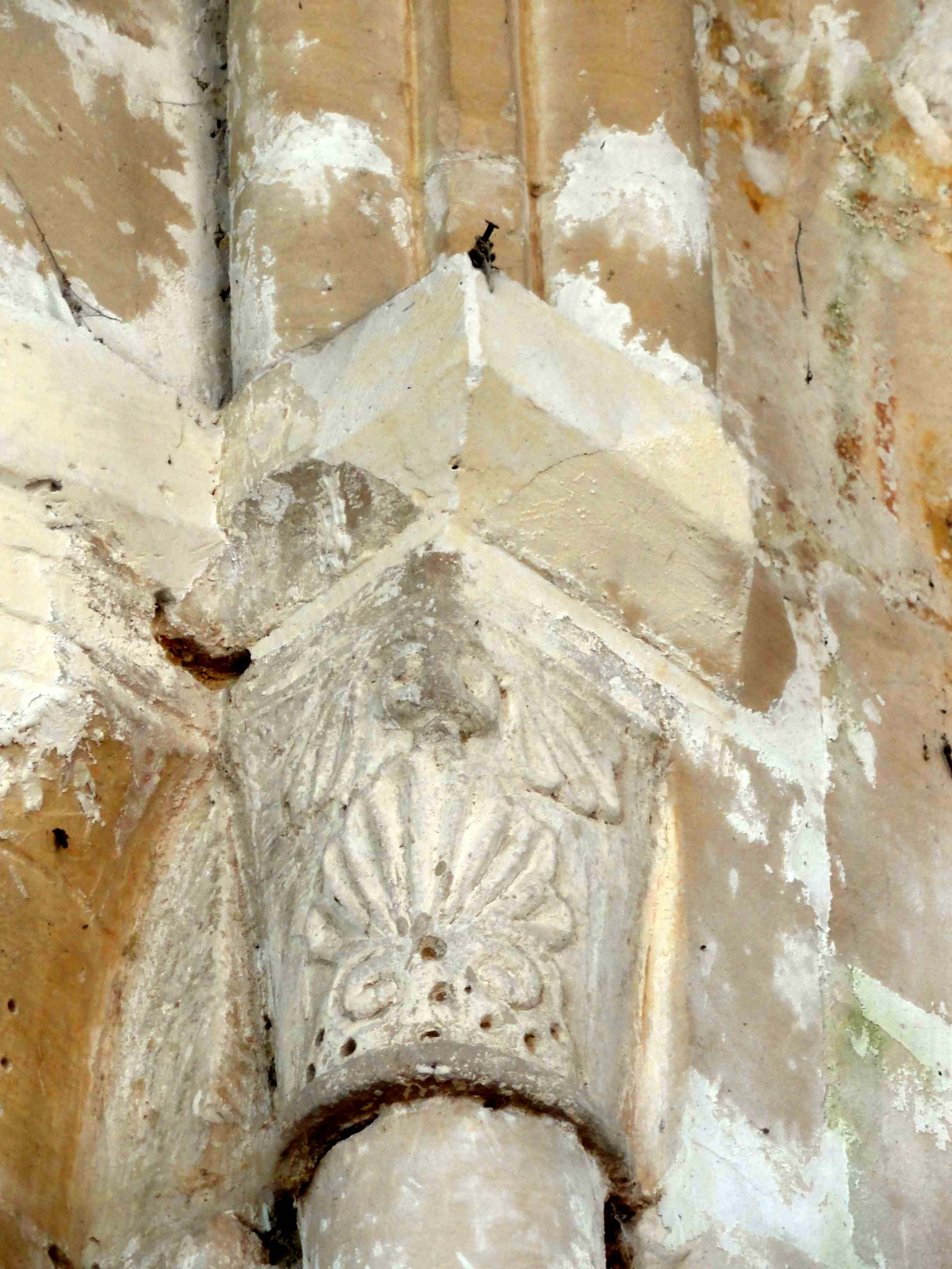 Chapiteau(x) - voir titre.